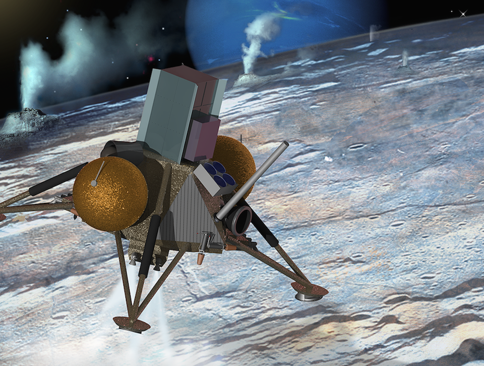 Космический аппарат